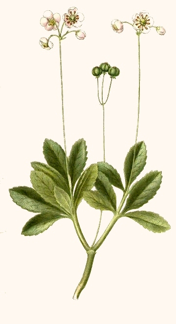 Original Description Ryl, Chimaphila umbellata (L.) Nutt.